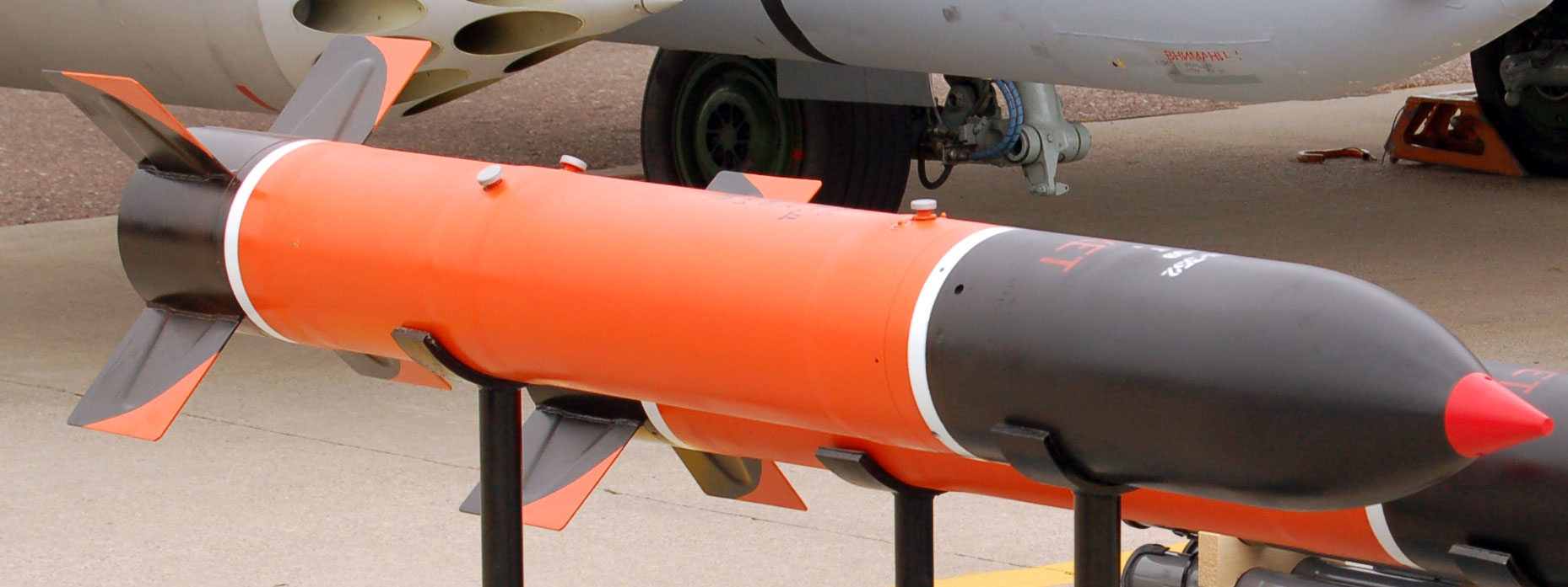 НАР С-24Б на МАКС2009